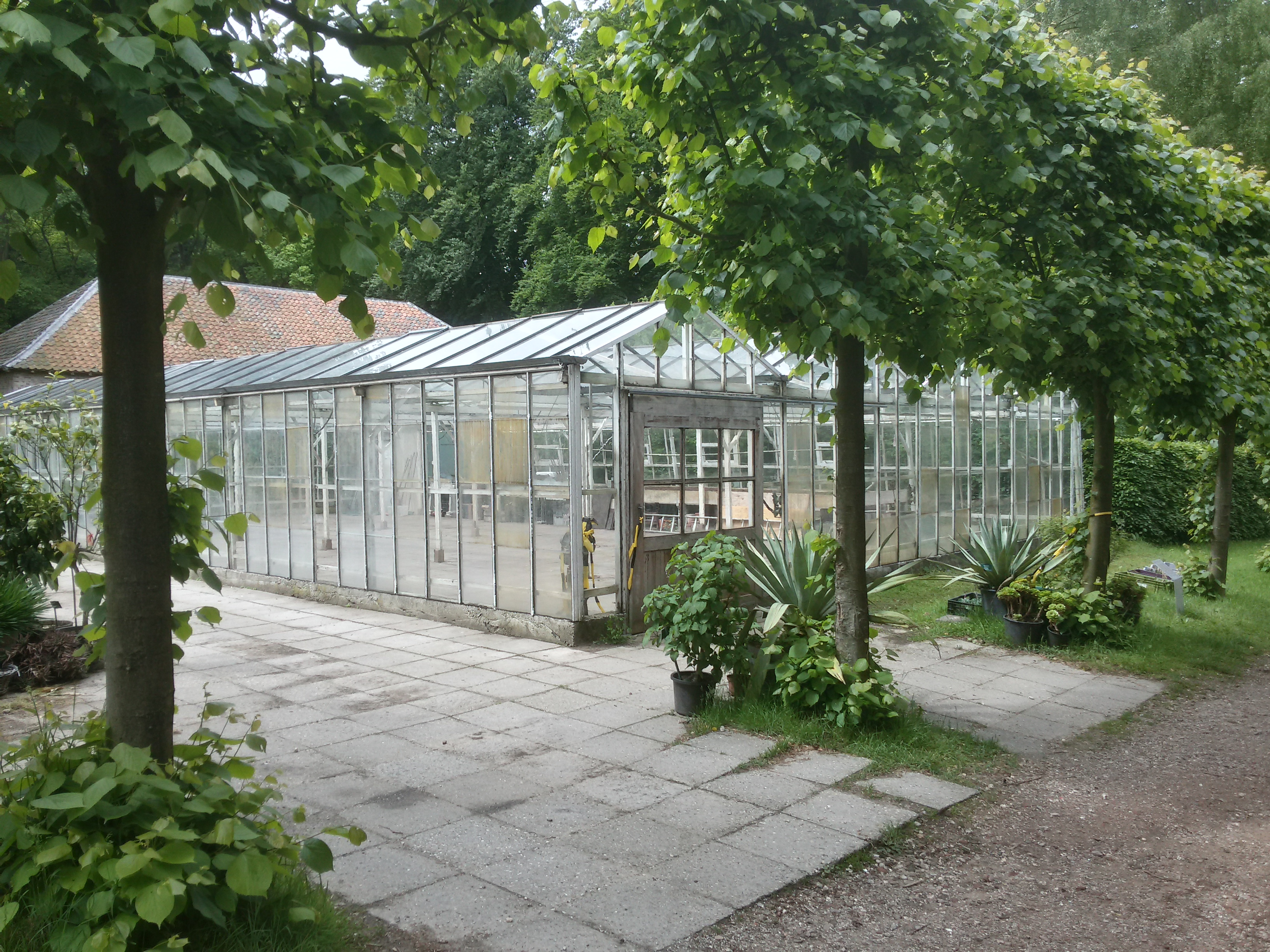 Openluchtmuseum Arnhem, Venloos warenhuis (tuinderskas) uit Huissen